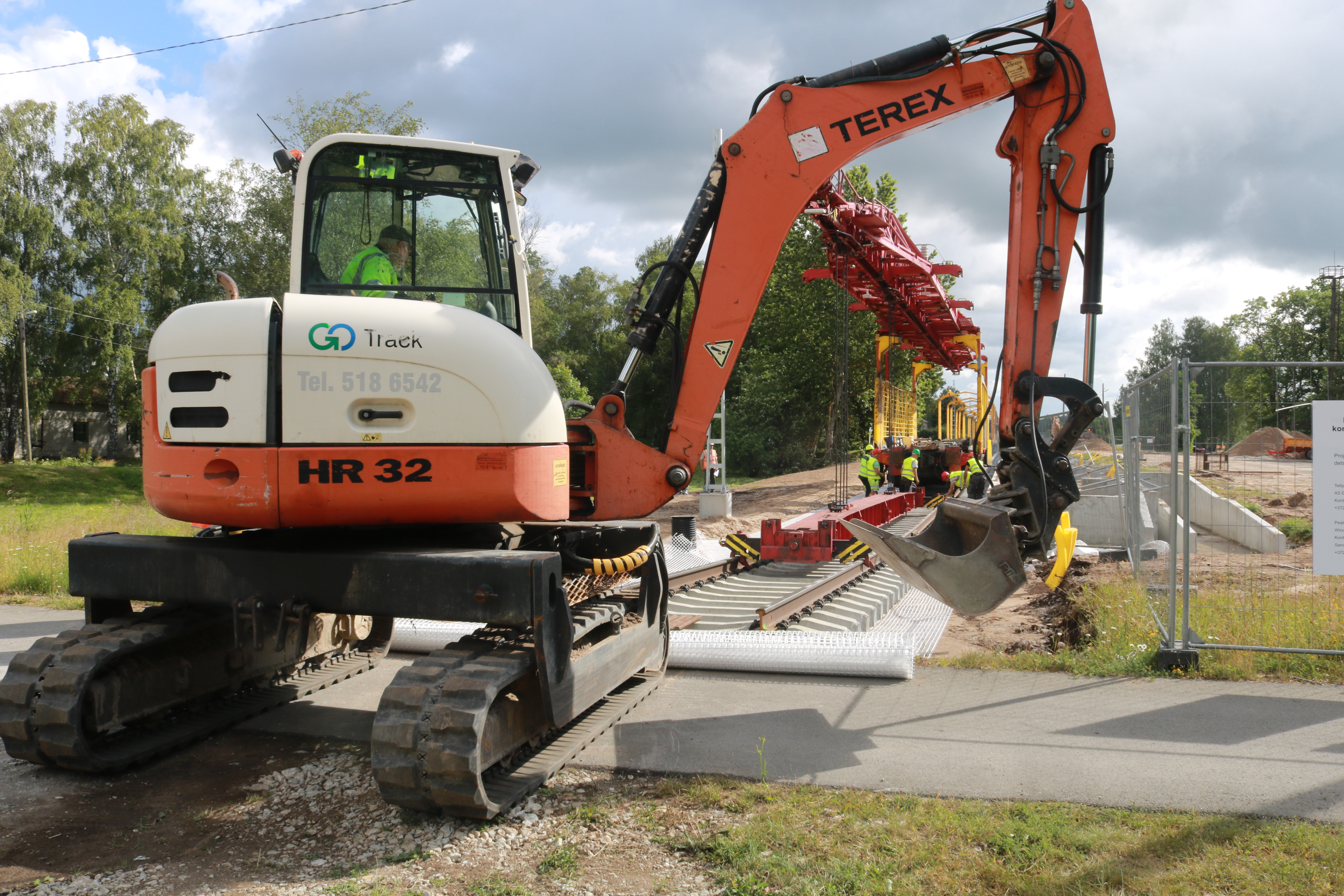 Riisipere Turba raudtee rööpad jõudsid Turba 2.07.2019